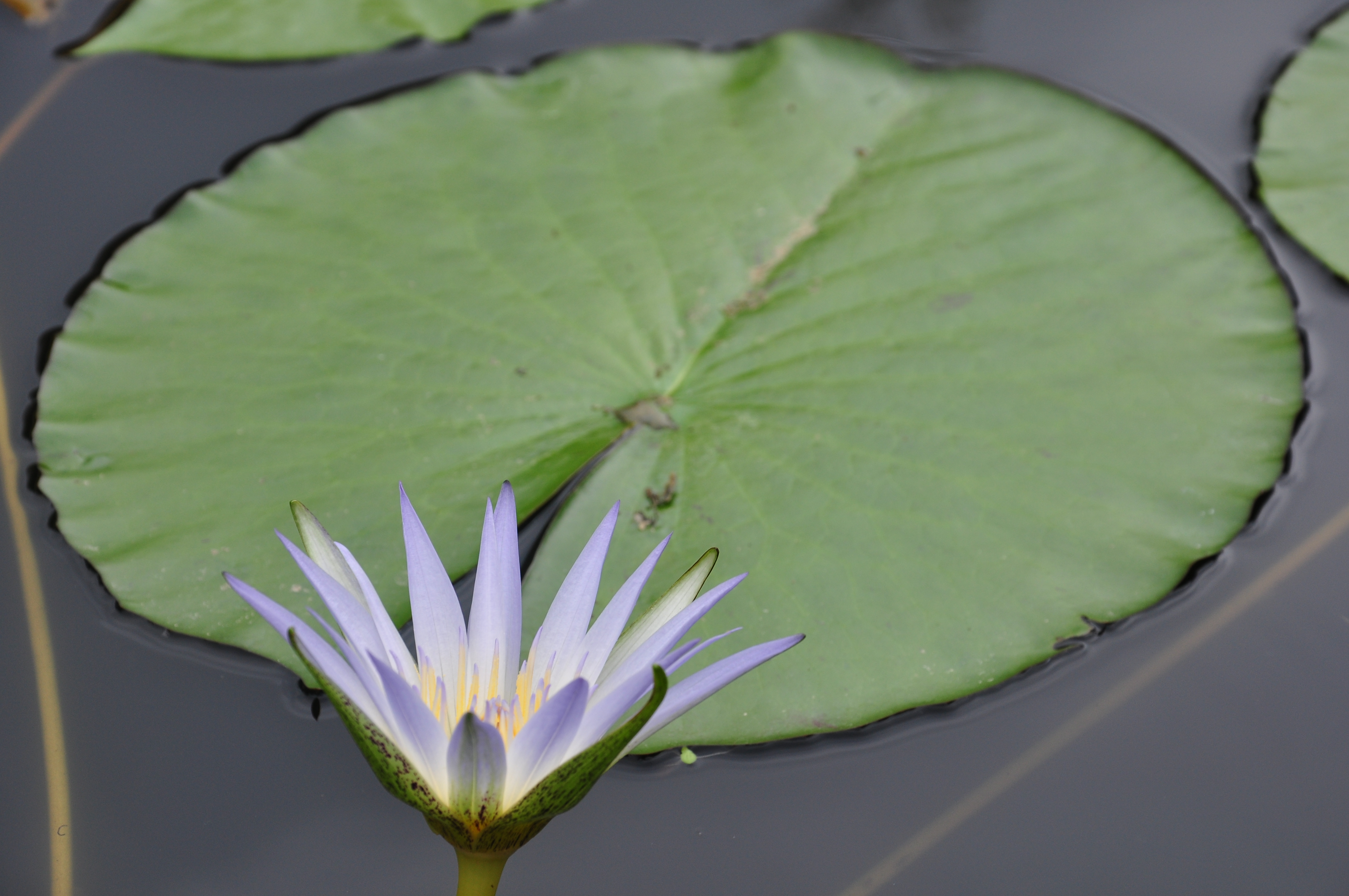 Botanischer Garten der Universität Zürich in Zürich-Weinegg (Switzerland) : Nymphaea